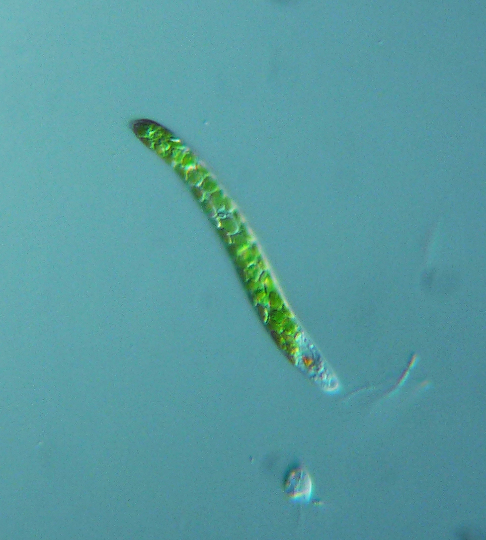 Euglena mutabilis - 400x - 1